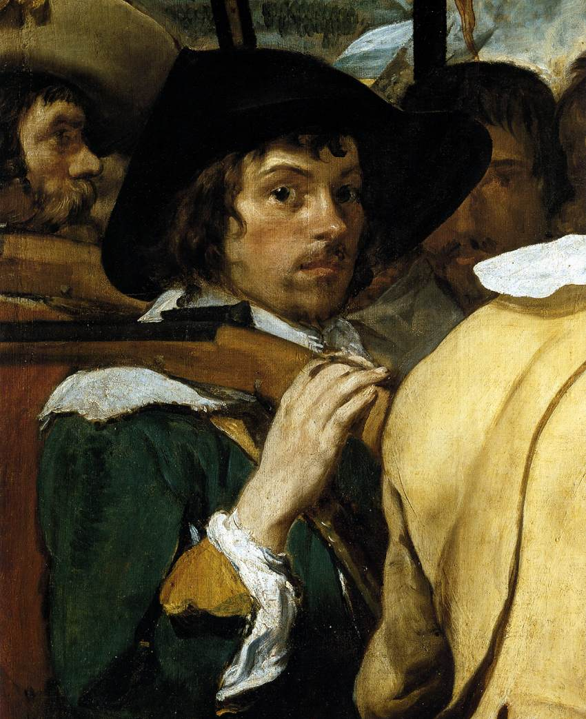 La obra representa el momento en que Justino de Nassau rindió la ciudad de Breda, en 1625, a las tropas españolas al mando del general Ambrosio Spínola, que aparece recibiendo las llaves de la ciudad de manos de su enemigo.